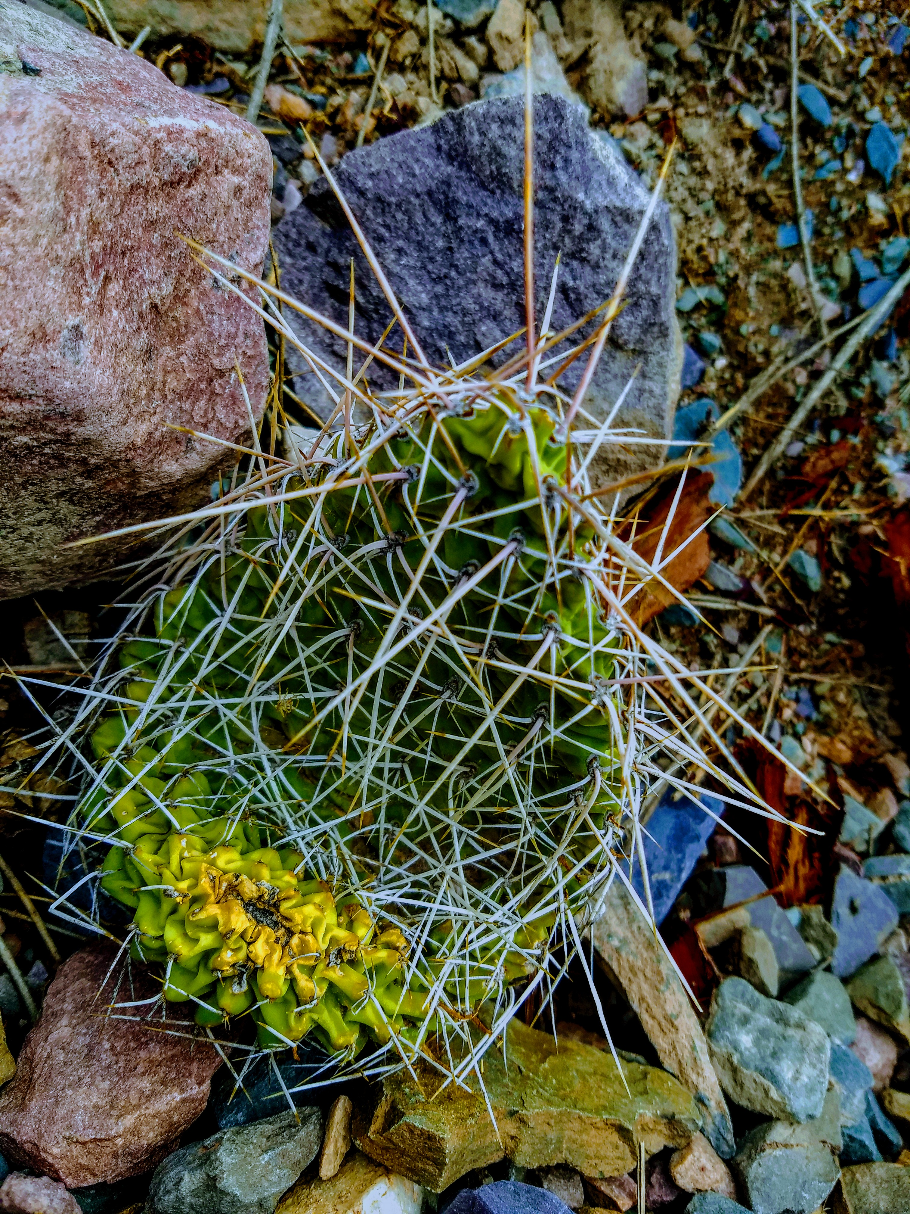 Foto tomada a un cactus creciendo entre rocas en el camino al mirador del pueblo de Iruya.